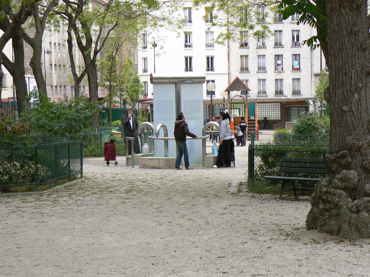 Une vue de la fontaine du square de la Madone, il s'agit d'un puis artésien dont l'eau provient des sables aquifères de l'Albien. L'eau est gratuitement mise à disposition aux habitants des alentours.